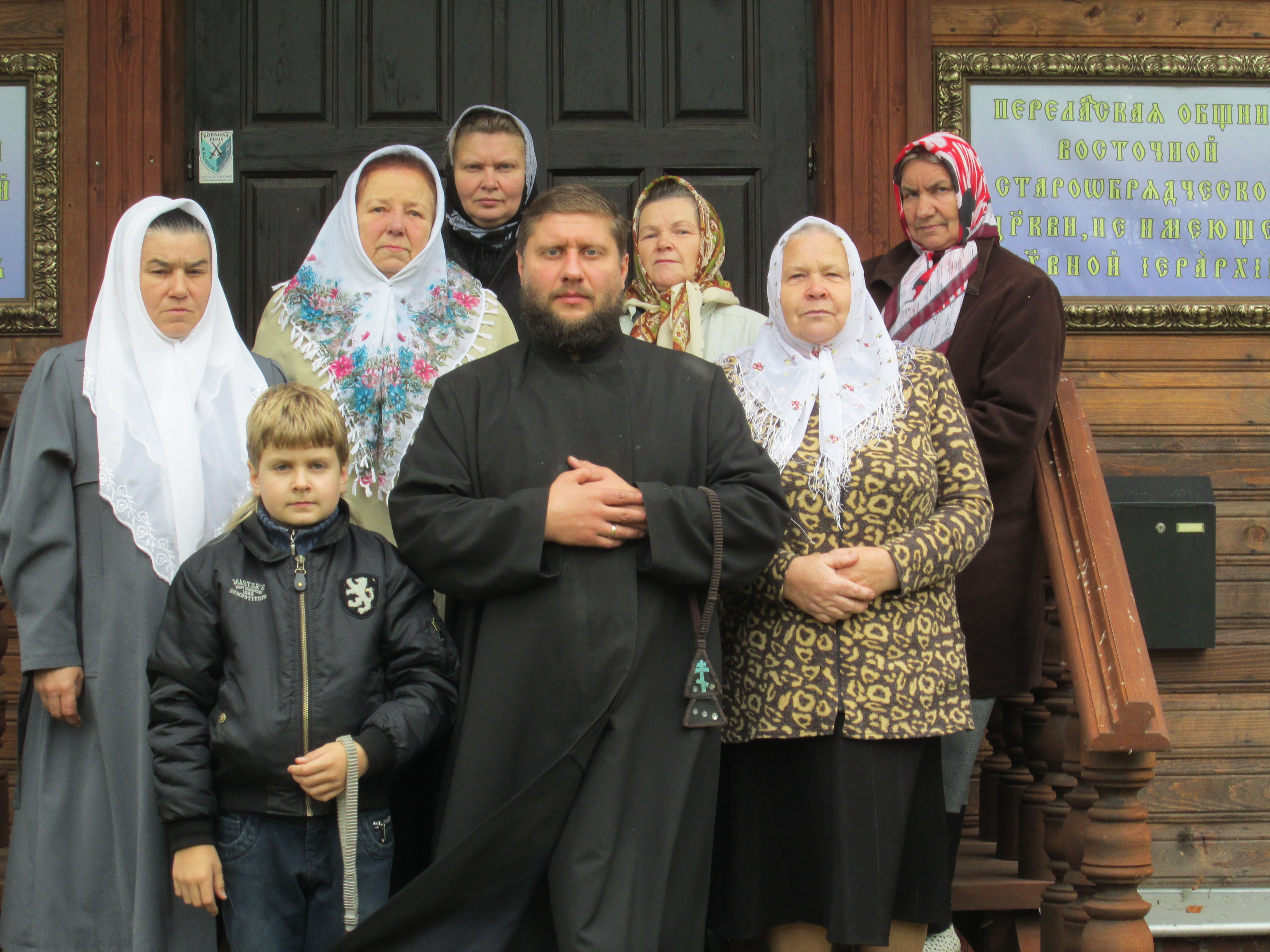 Воздвижение Честнаго Креста Господня